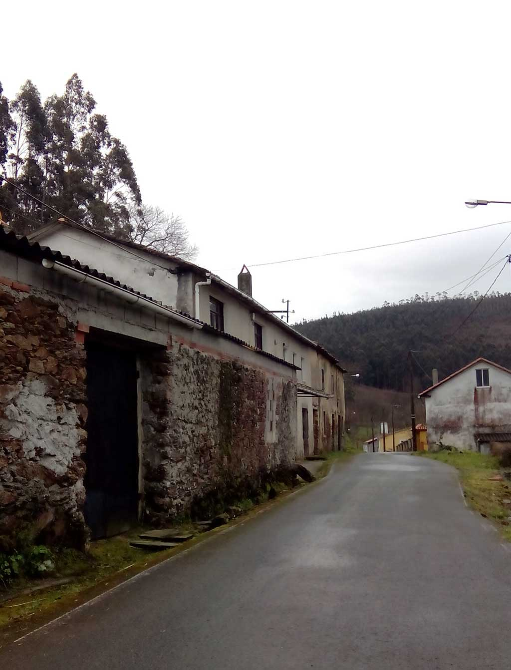 Vista das Cerdeiras, Doso, Narón.